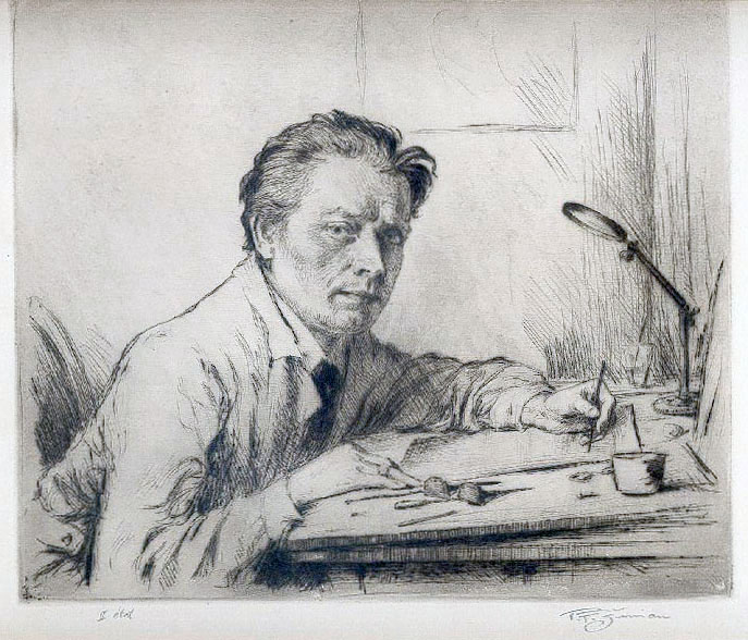 Vlastní podobizna, suchá jehla, 205x230 mm. A. Novák. Kronika Grafického díla T. F. Šimona, č. 394.